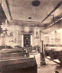 Ehemalige Synagoge in Cernay